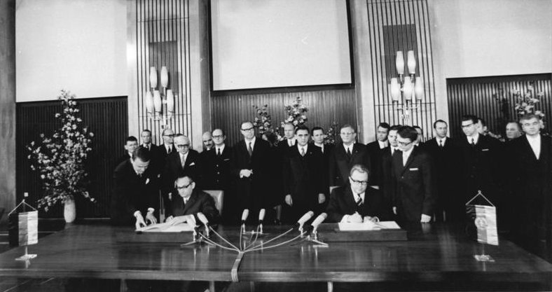 ADN-ZB Link 11.12.1971 Berlin-Transitabkommen paraphiert In der Hauptstadt der DDR, Berlin, wurde am 11.12.1971 das "Abkommen zwischen der Regierung der Deutschen Demokratischen Republik und der Regierung der Bundesrepublik Deutschland über dem Transitverkehr von Zivilen Personen und Gütern zwischen der Bundesrepublik Deutschland und Berlin (West)" durch den Staatssekretär beim Ministeramt der DDR Dr. Michael Kohl (r.), und den Staatssekretär im Bundeskanzleramt der BRD, Egon Bahr (l.), im Auftrag ihrer Regierungen paraphiert.